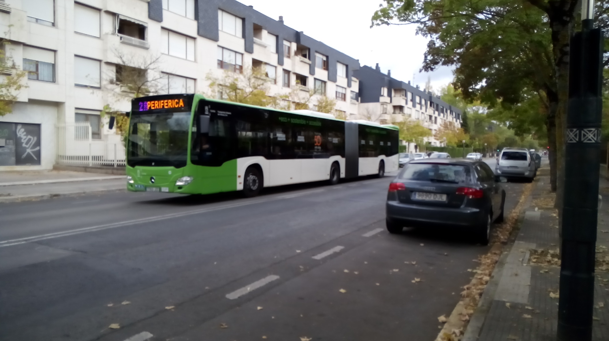 Tuvisa Verde